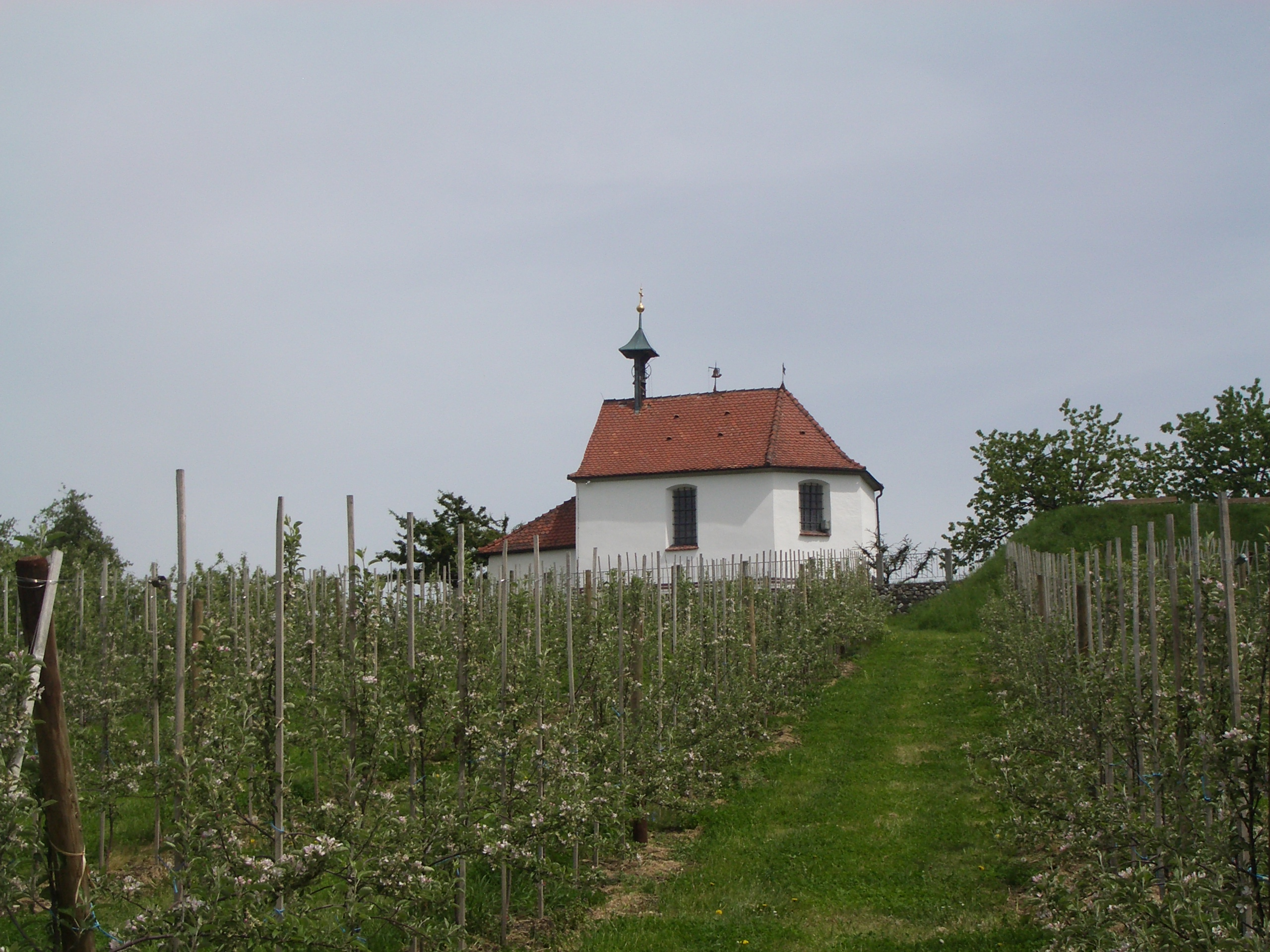 Antoniuskapelle Selmnau Wasserburg am Bodensee, Kreis Lindau, Bayern